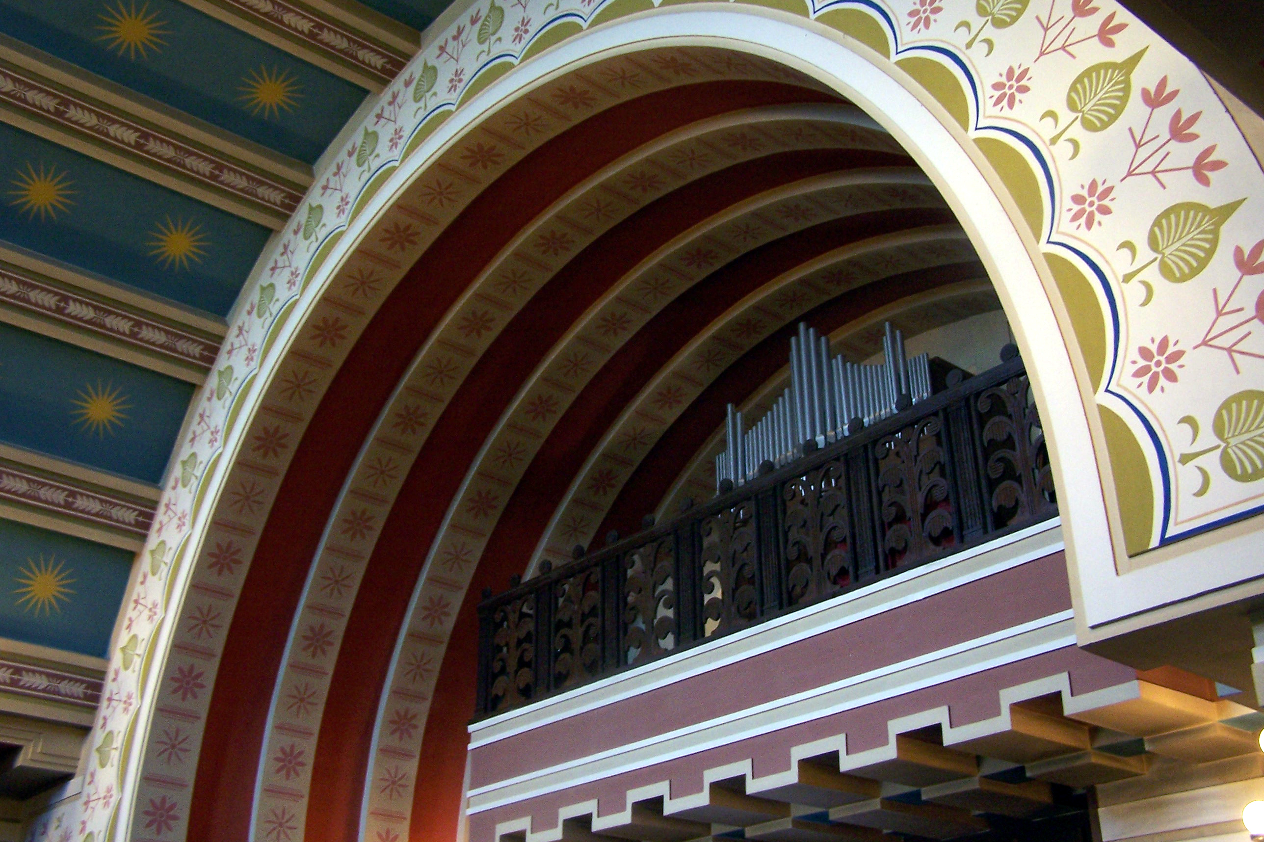 Pardubické krematorium, velká smuteční síň